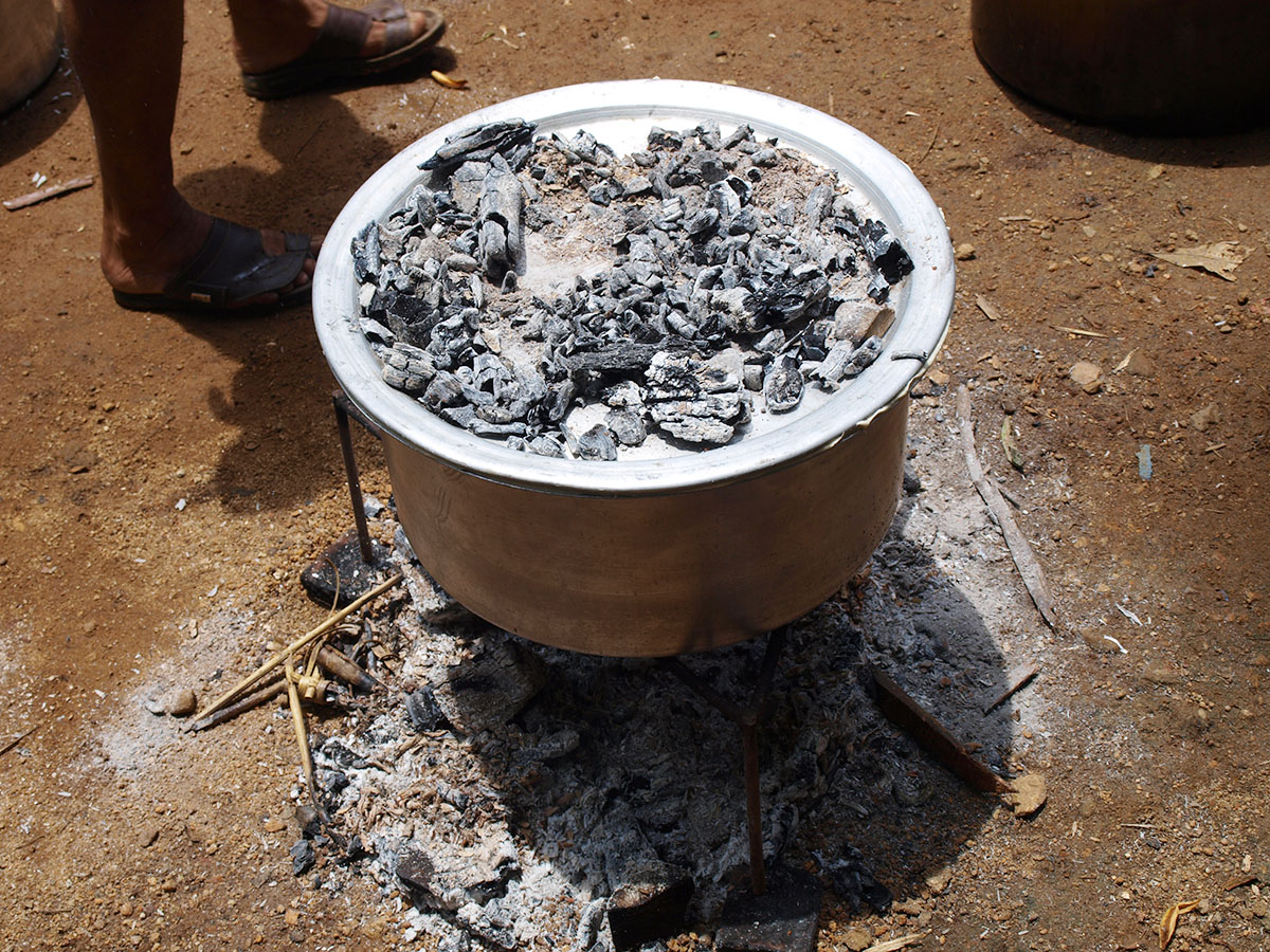 ബിരിയാണി ദം ഇടല്‍ പ്രക്രിയ. പാത്രത്തിന്റെ വക്കുകളില്‍ മൈദ മാവ് കുഴച്ച് വെച്ച് അടപ്പു കൊണ്ട് അടച്ച് അടിയിലും മുകളിലും തീക്കനല്‍ ഇടുന്നതിനെയാണ് ദം ഇടല്‍ എന്ന് പറയുന്നത്‌